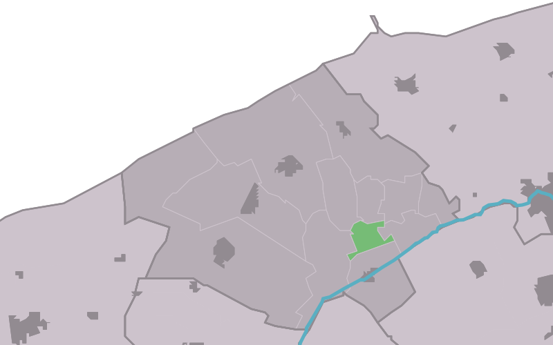 Kaartsje fan himrik fan Jislum